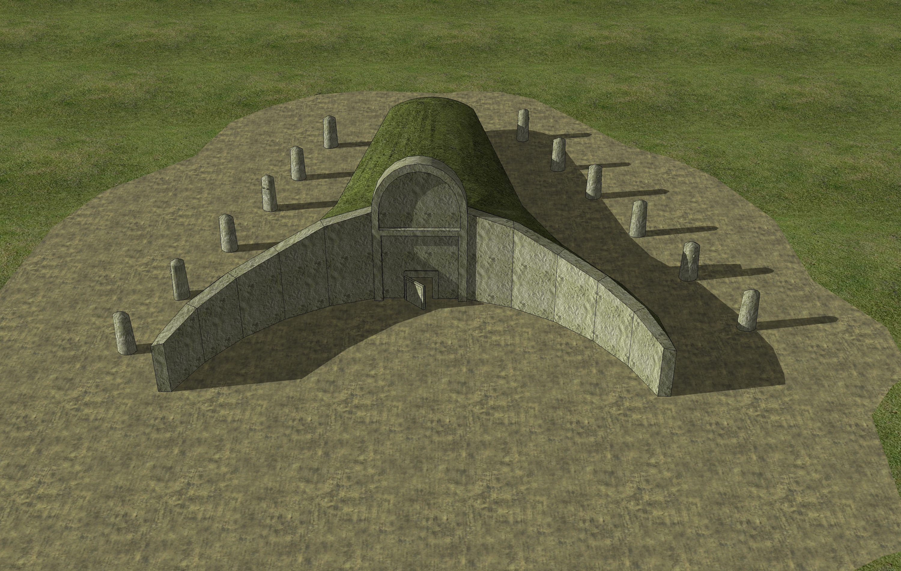 Modello 3D della tipologia di Tomba dei Giganti ad esedra con arco centinato.